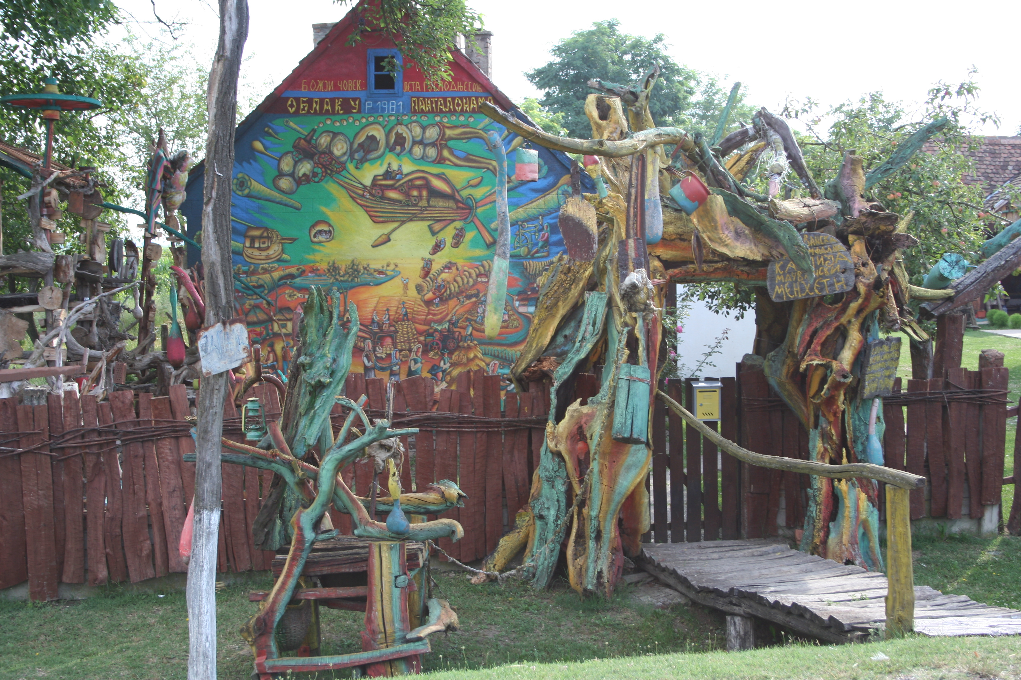 Naivna umetnost, Crna Bara